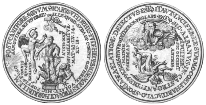 Geuzenmedaille auf den Abbruch des Standbildes Herzog Albas in der Zitadelle von Antwerpen (Vorder- und Rückseite, freigestellter Kupferstich)